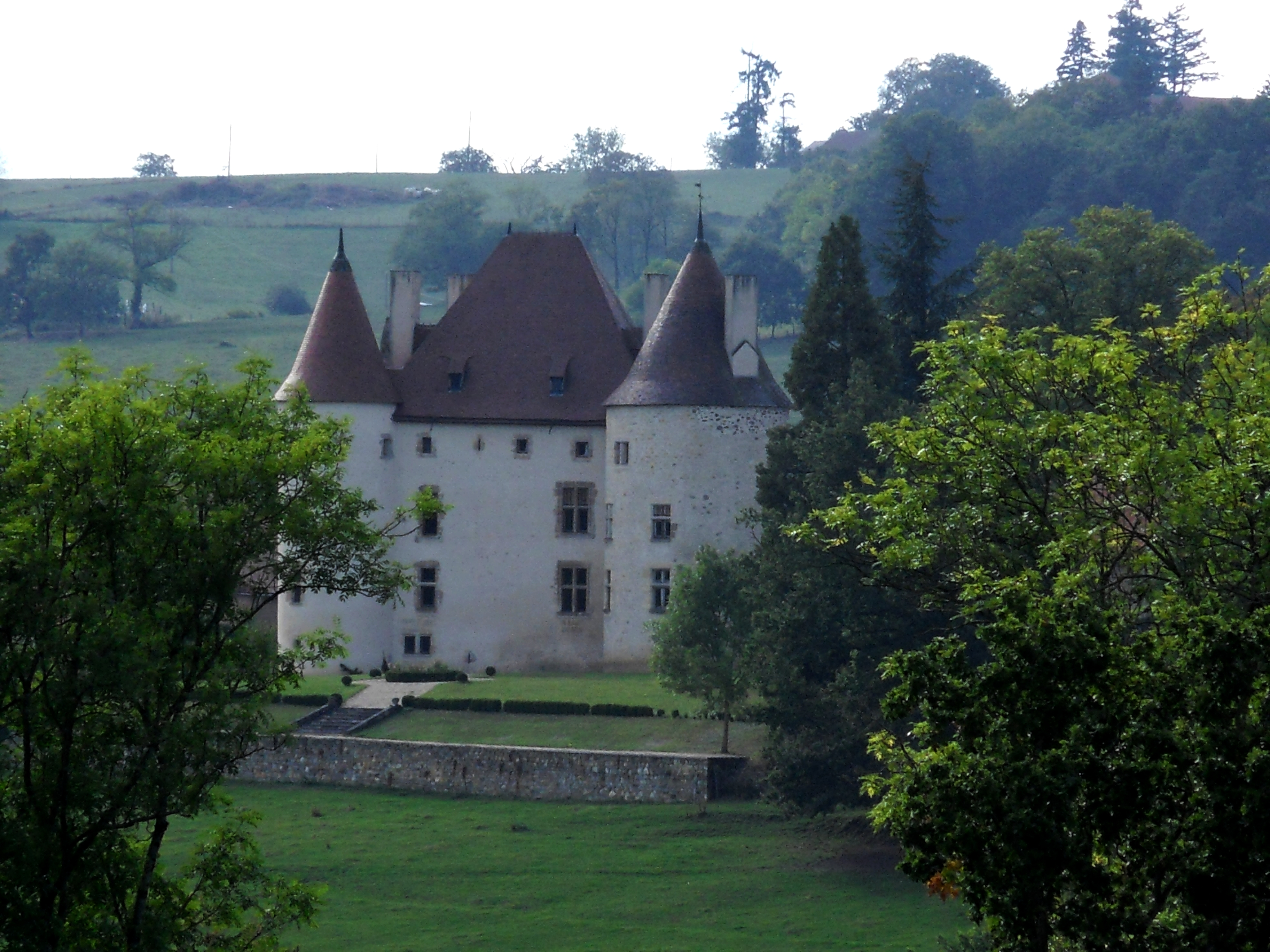 Château de Verseilles, (Inscrit, 2003) .